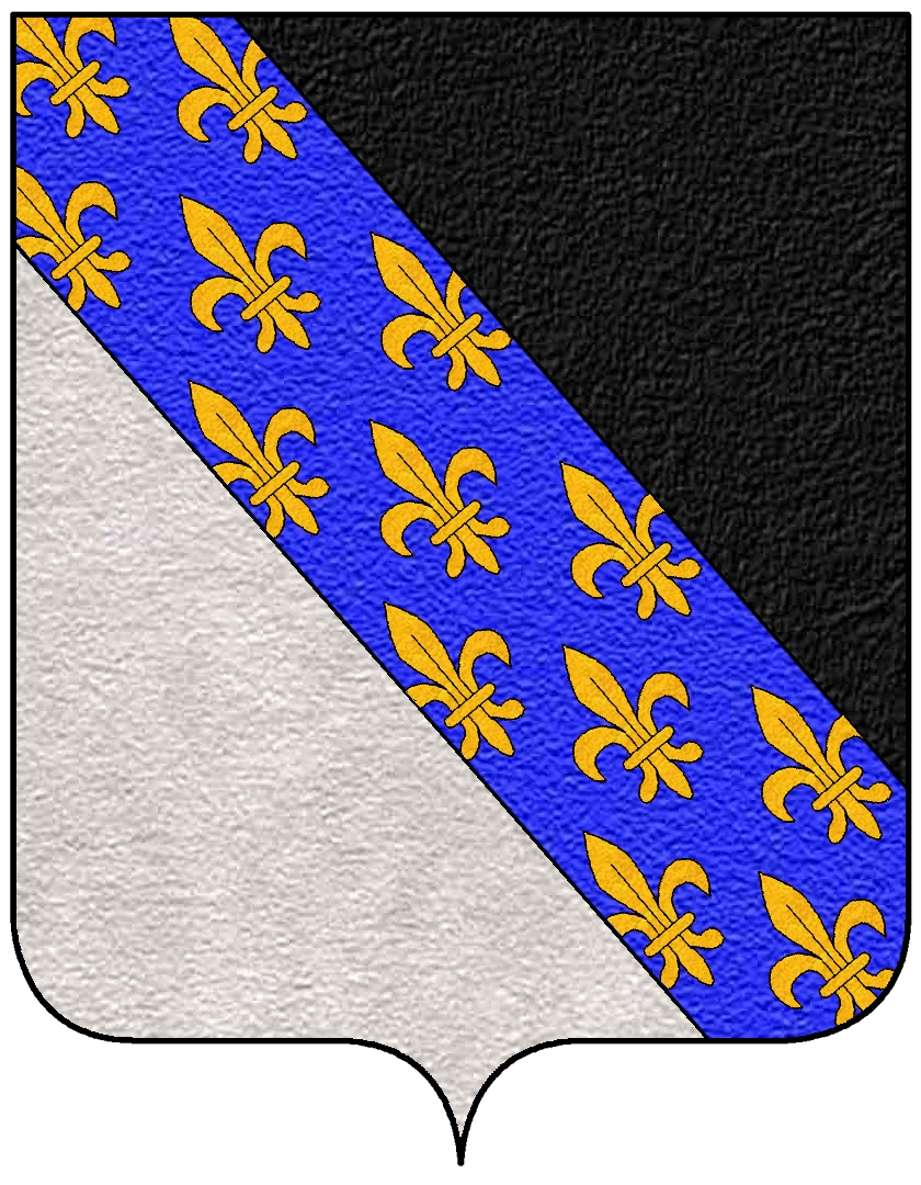 Stemma della famiglia Vettori